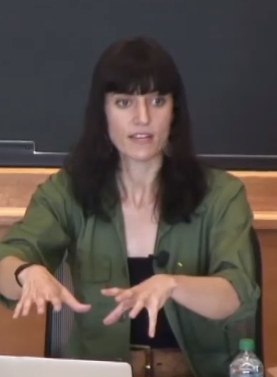 Drawing from her recent book, "The People’s Platform: Taking Back Power and Culture in the Digital Age," and her experience as an artist and an activist, Astra Taylor, filmmaker, writer, and political organizer, addresses campaigns by musicians against streaming services and debtors against creditors to reflect on the larger question of how to organize and leverage change in an age of virtual networks.